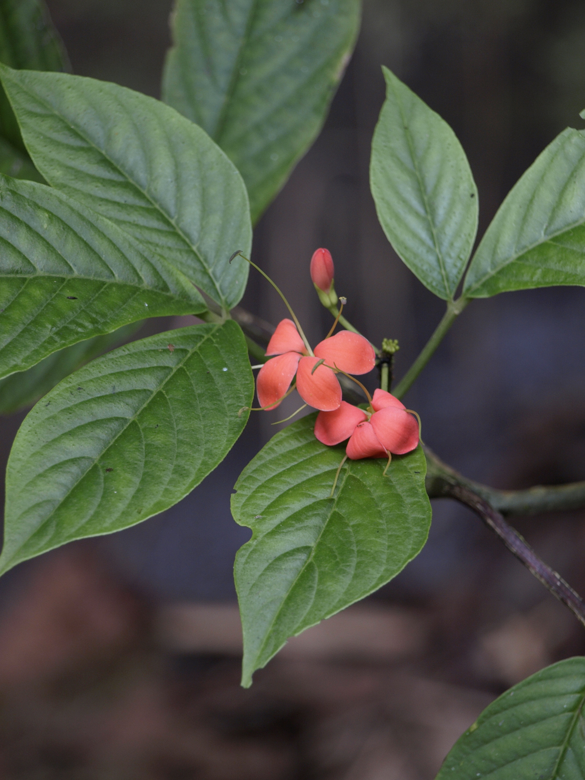 Podandrogyne decipiens La Paz Waterfall Gardens, Costa Rica